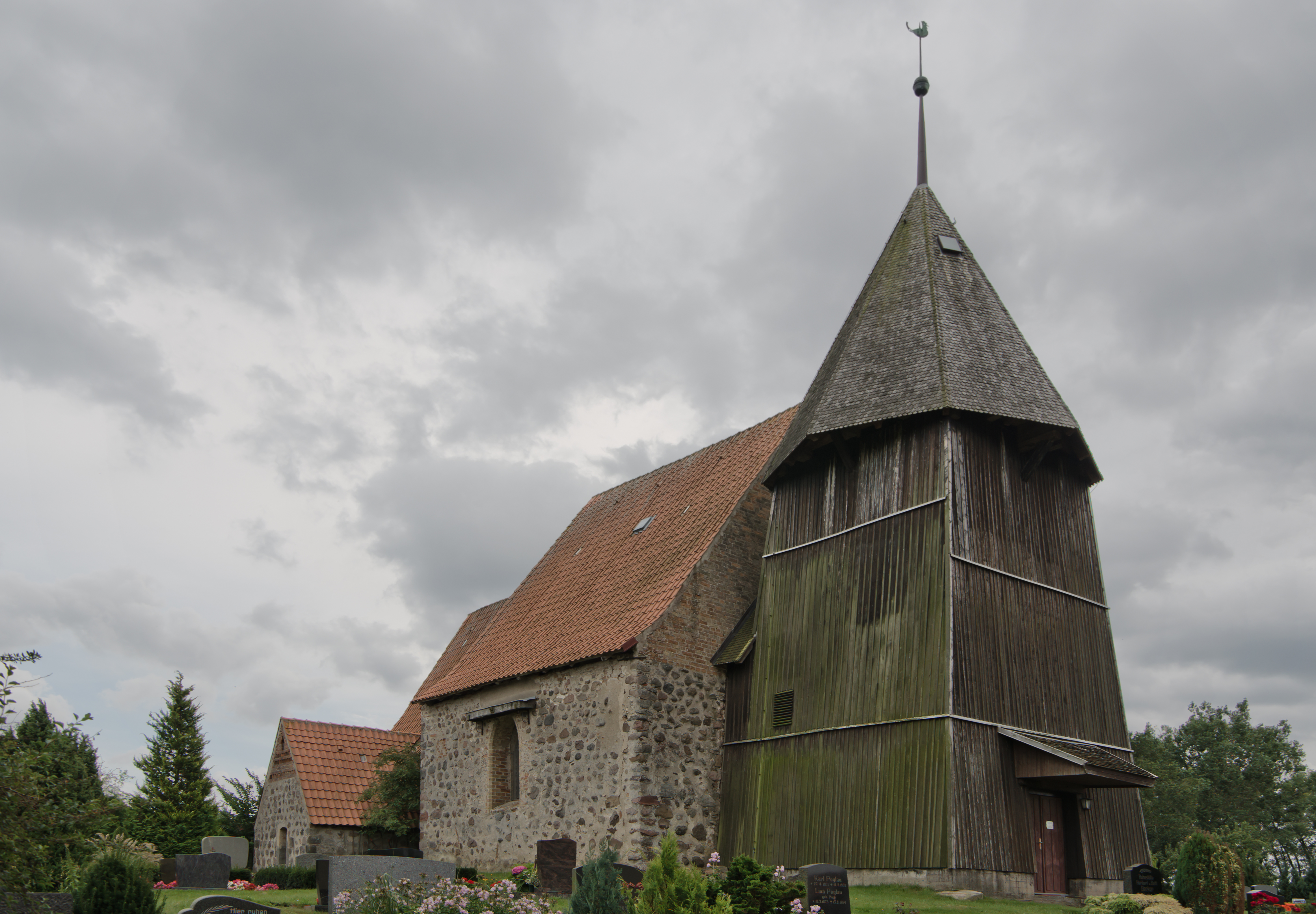 Dorfkirche Heiligenhagen